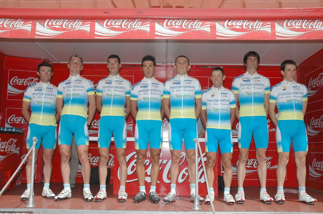 Fuerteventura-Canarias